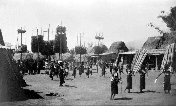 Negatief. Feest op het terrein van kampong Wéré in Ngada, Flores